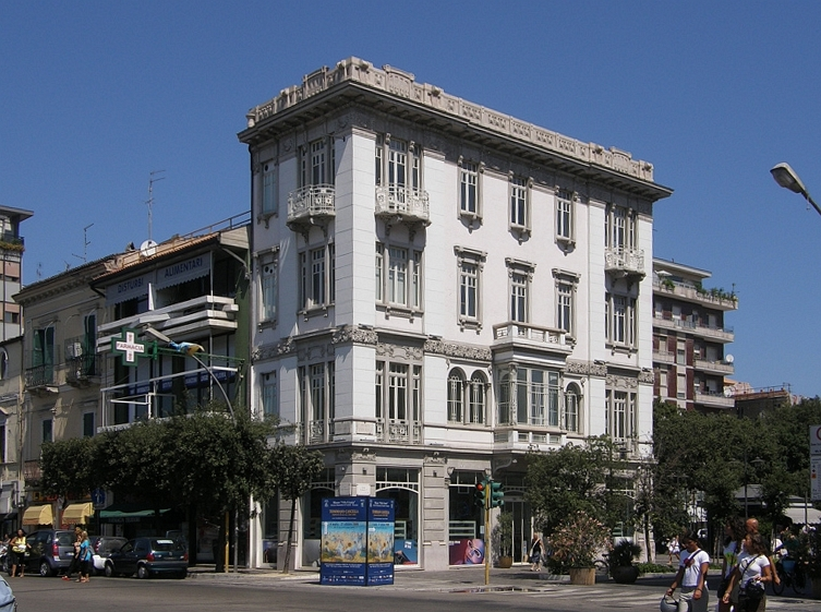 Pescara